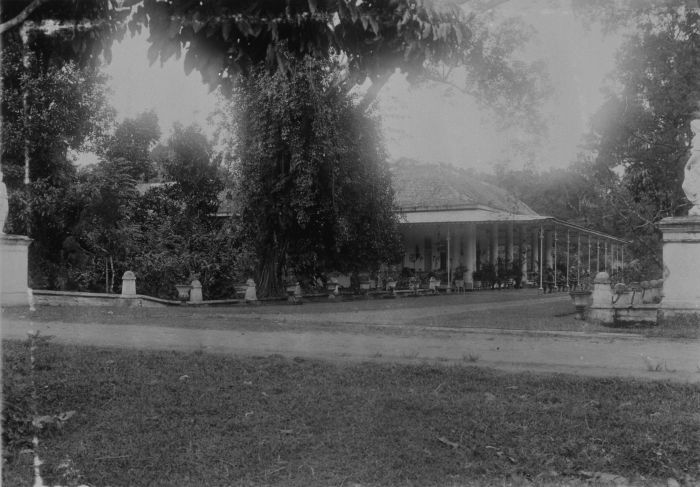 Foto. Landhuis in Soebang, West-Java.